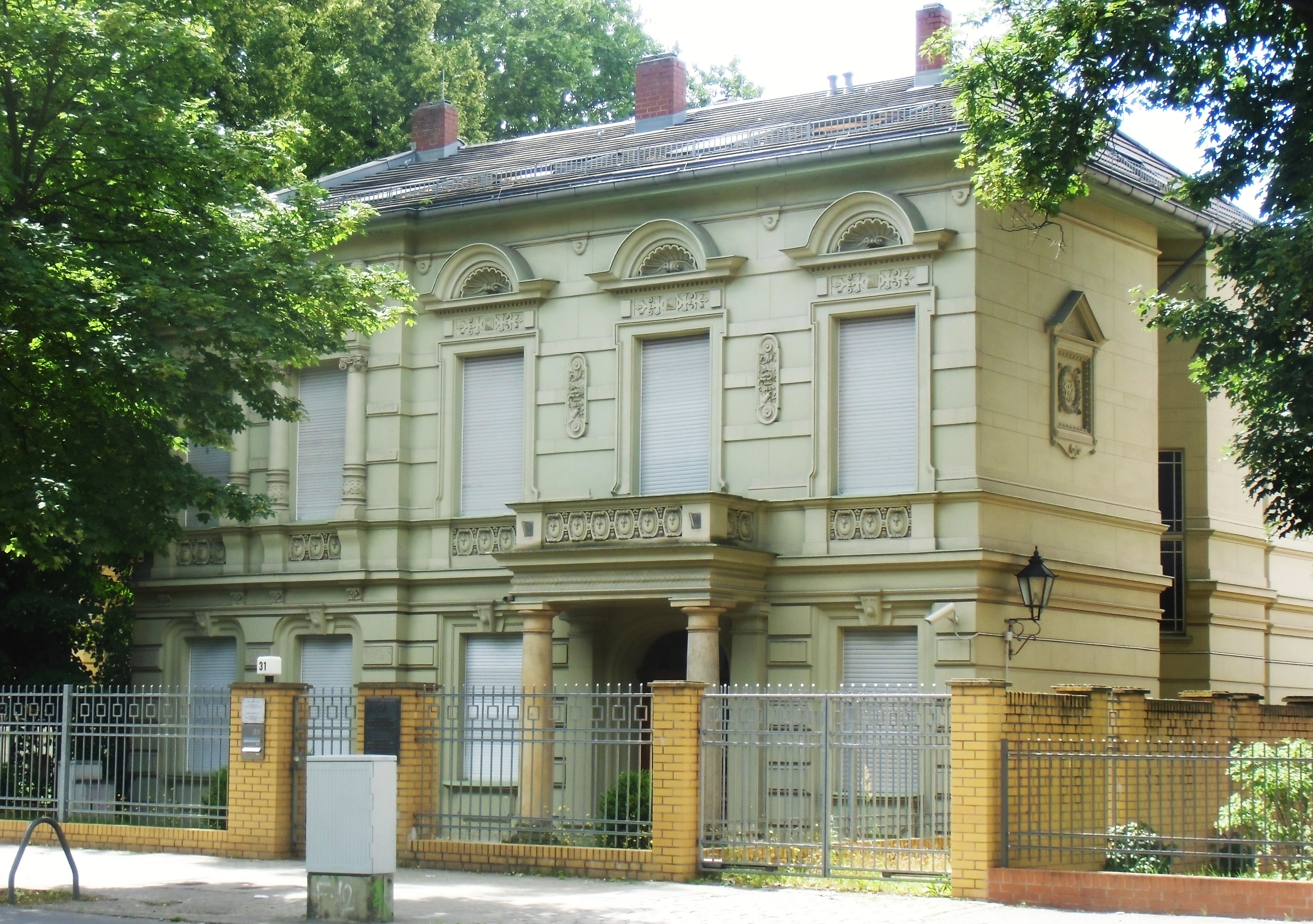 Denkmalgeschütztes ehemaliges Wohnhaus, erbaut 1888, jetzt Sitz der Konsularabteilung der Botschaft von Belorußland